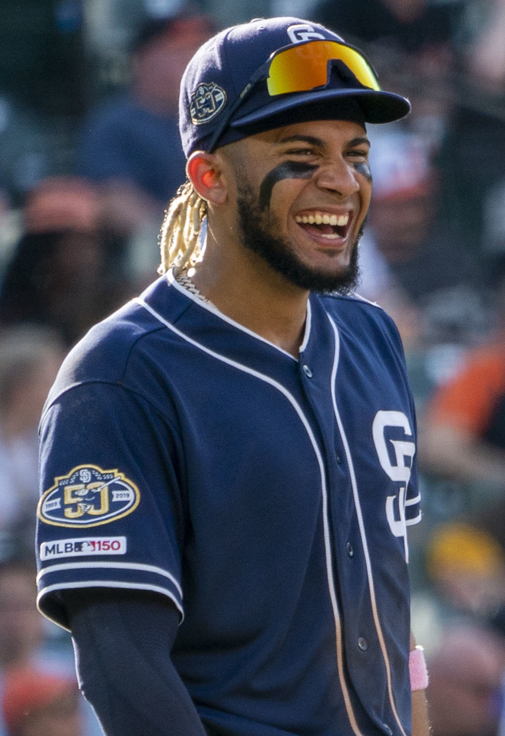 Padres at Orioles 6/26/19